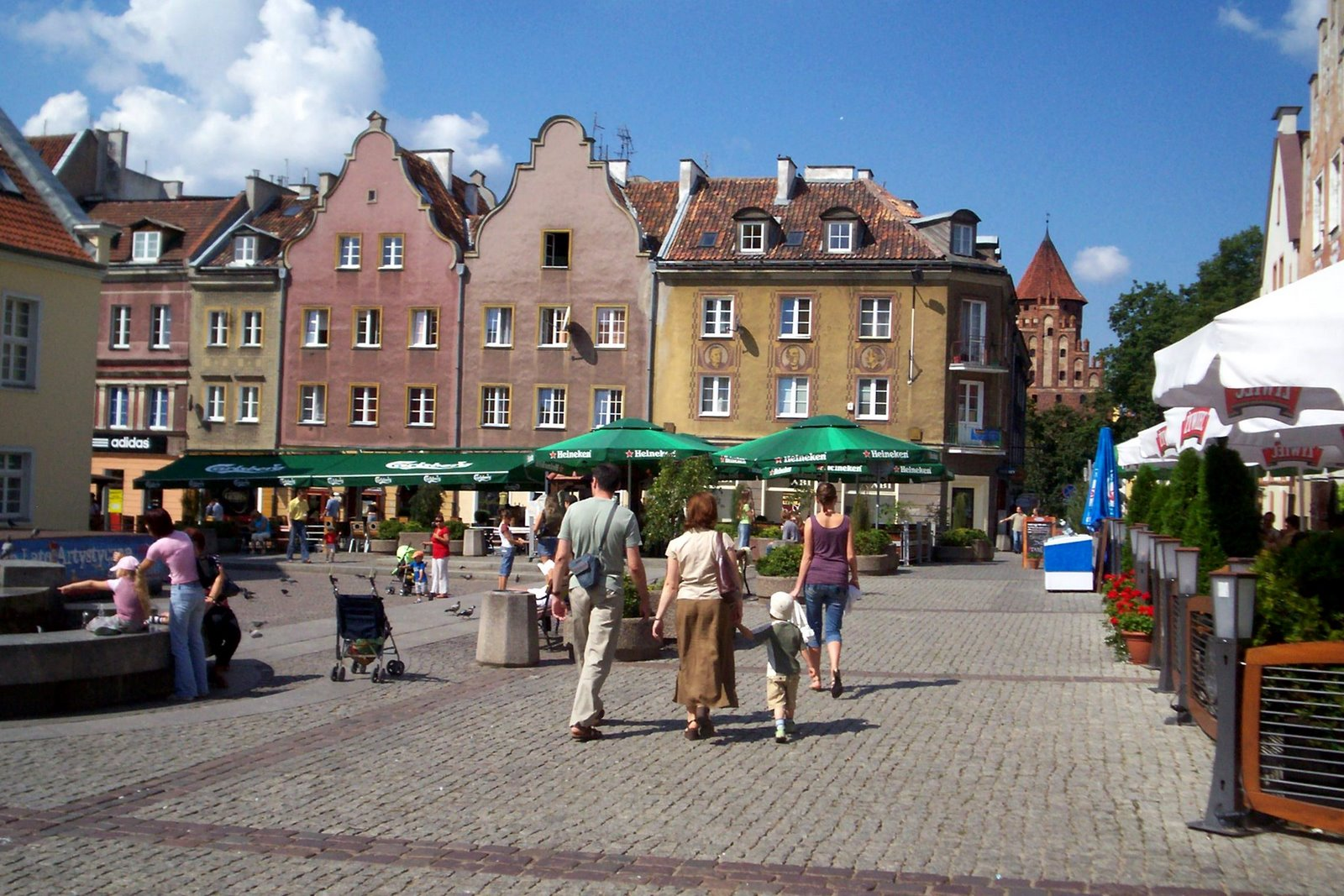 ul. Stare Miasto w Olsztynie